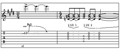 Dive Bomb in Hendrix Star spangled Banner Version